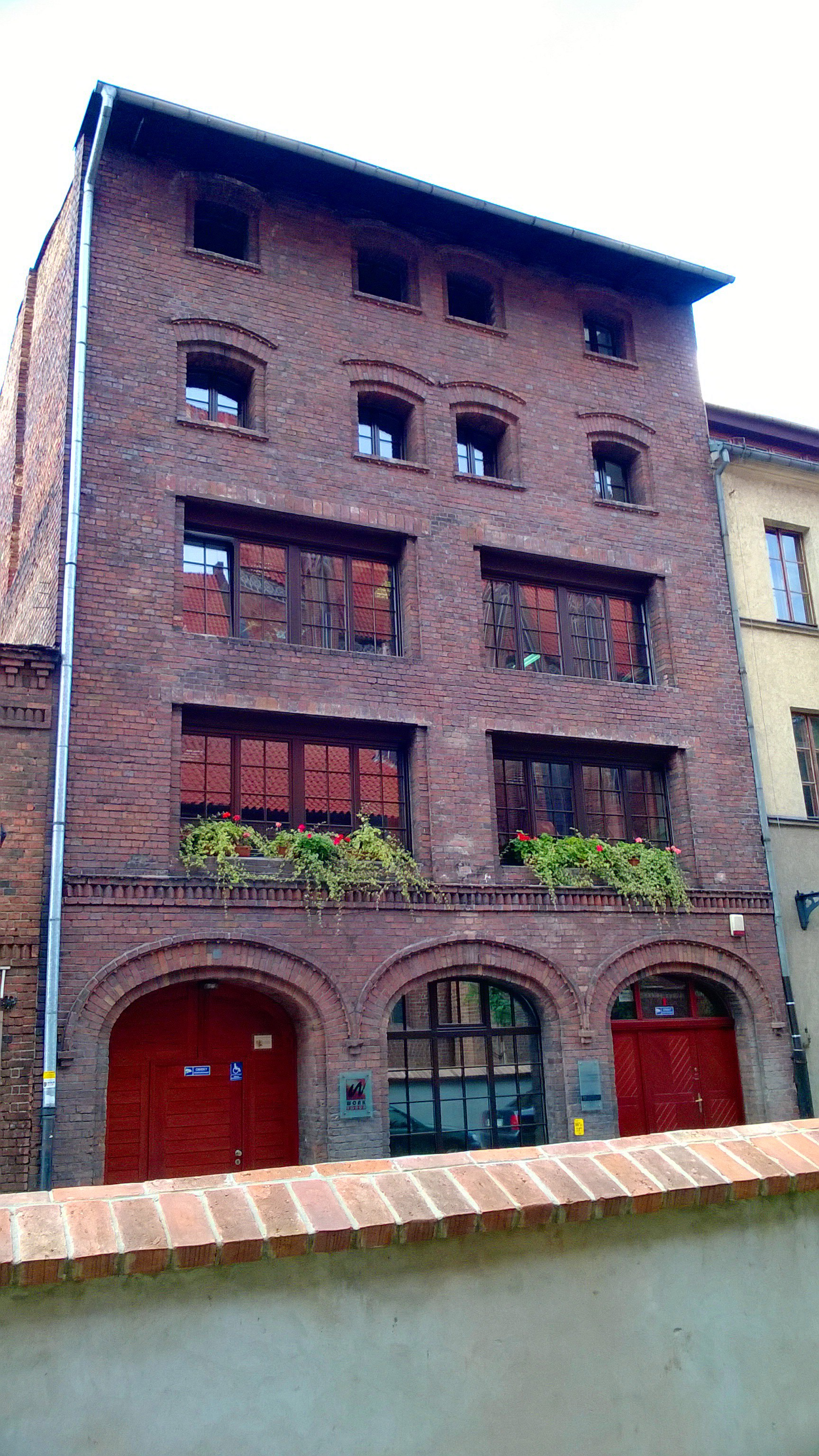 Wojewódzki Ośrodek Animacji Kultury w Toruniu